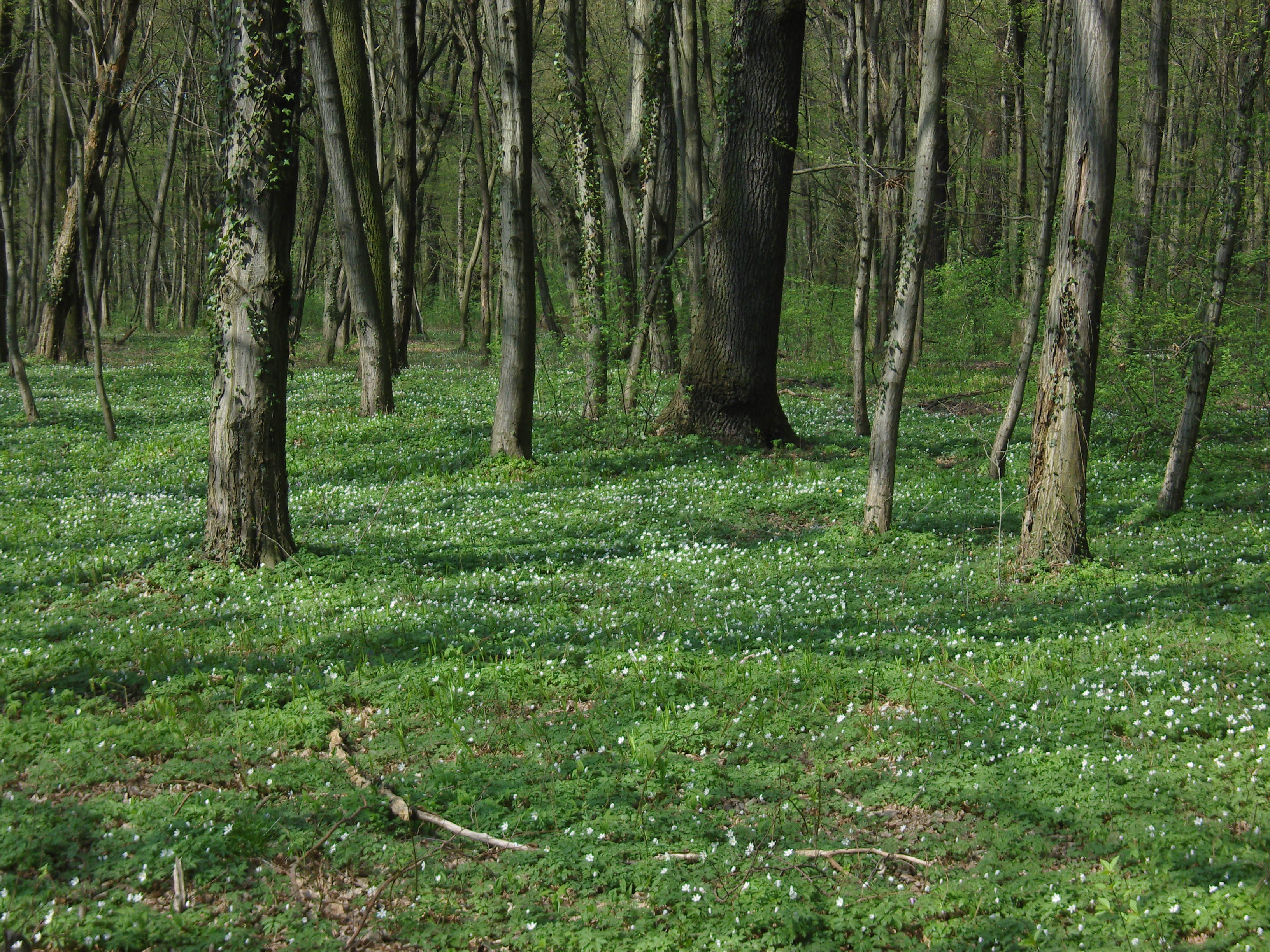 Blühende Anemonen im Niemtscher Park in Niemtsch einem Ortsteil von Senftenberg